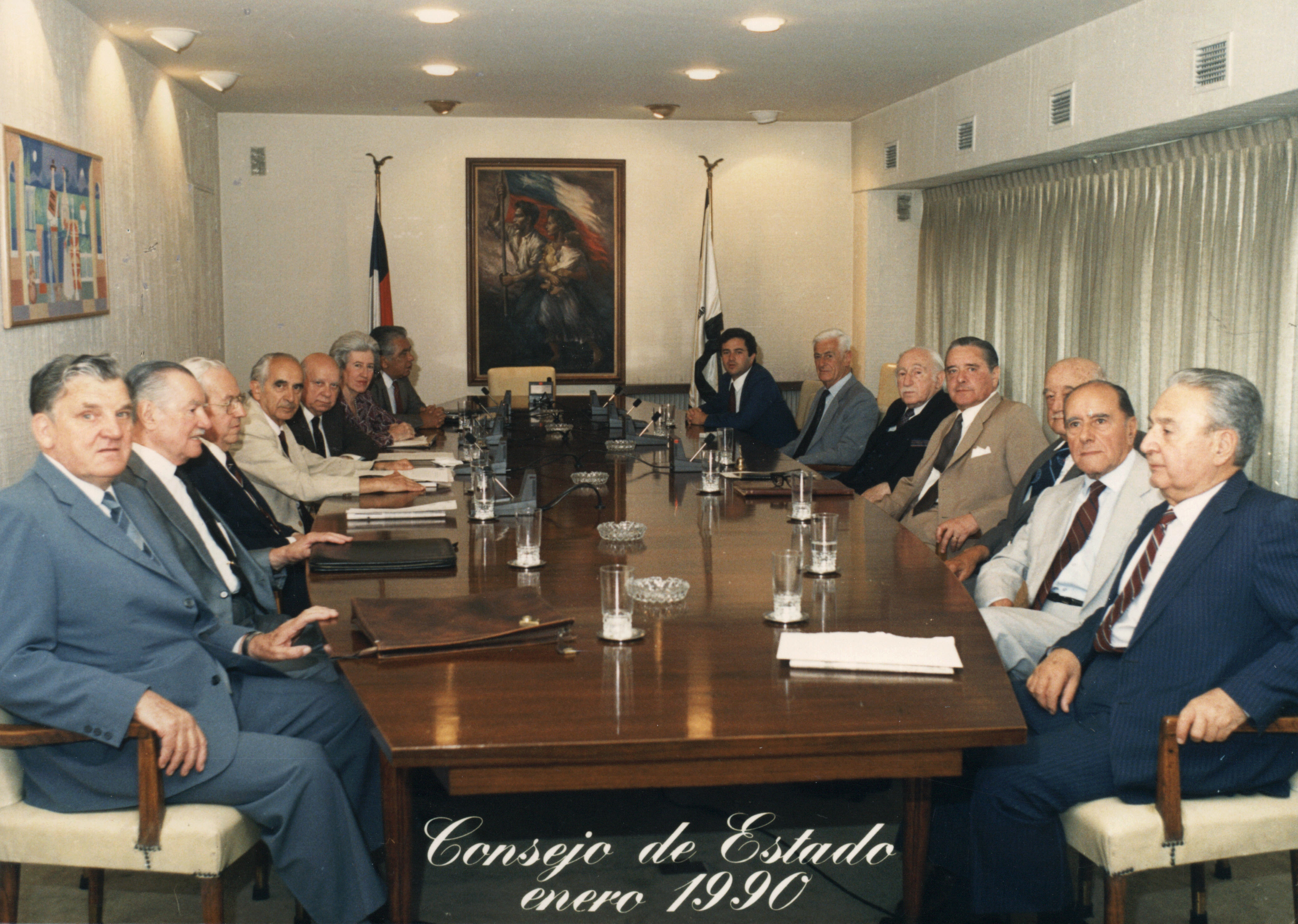 Consejo de Estado de Chile, enero de 1990. De izquierda a derecha: Carlos Guerraty, Jacobo Neumann Etienne, desconocido, William Thayer Arteaga, Modesto Collados, Mercedes Ezquerra, desconocido, Juan Antonio Coloma Correa, Eugenio Heiremans, desconocido, desconocido, Vicente Huerta Celis, Luis Miqueles, desconocido.